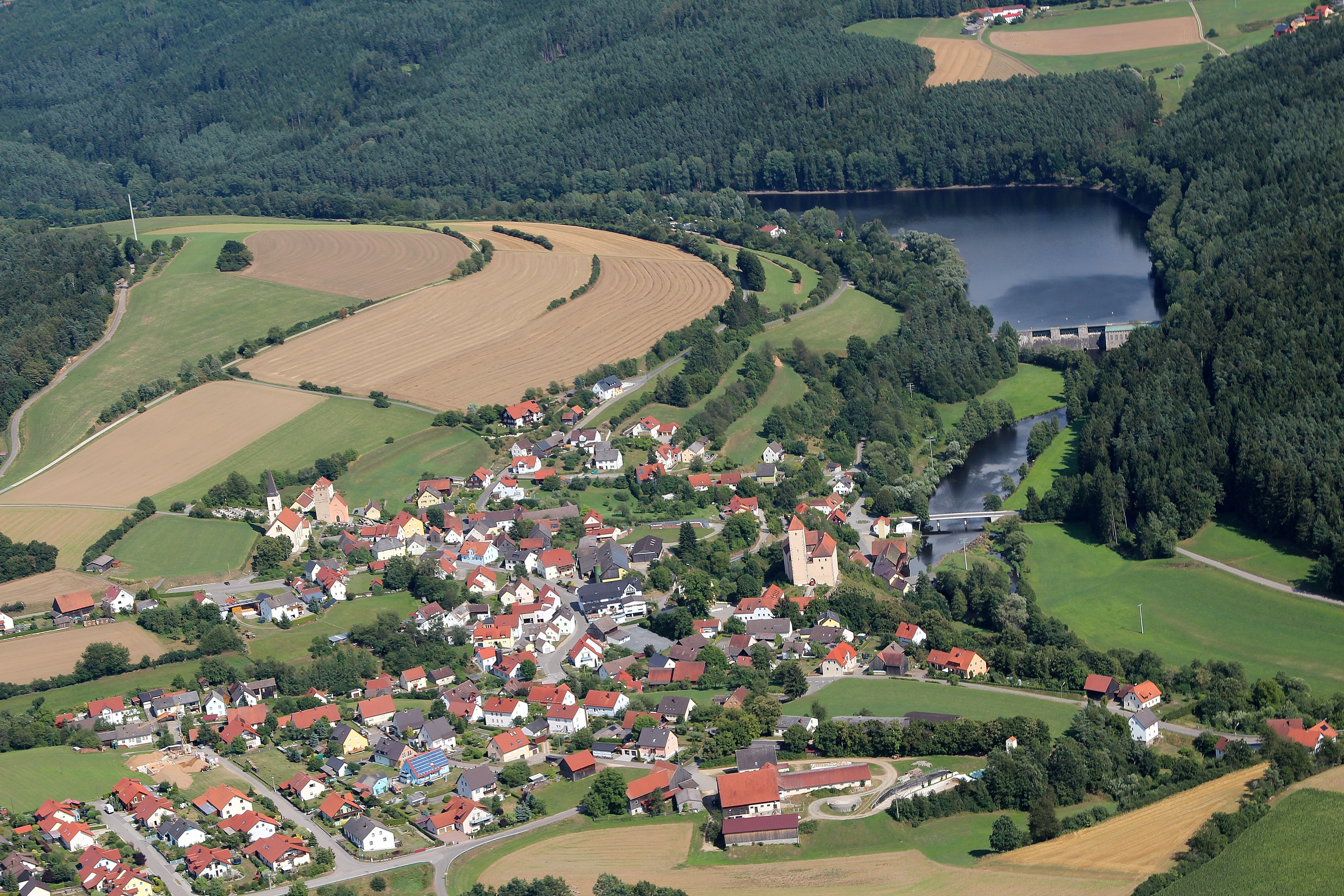 Trausnitz mit Burg und Stausee (links neben der Staumauer der Campingplatz Trausnitz): Gemeinde Trausnitz, Landkreis Schwandorf, Oberpfalz, Bayern (2013)